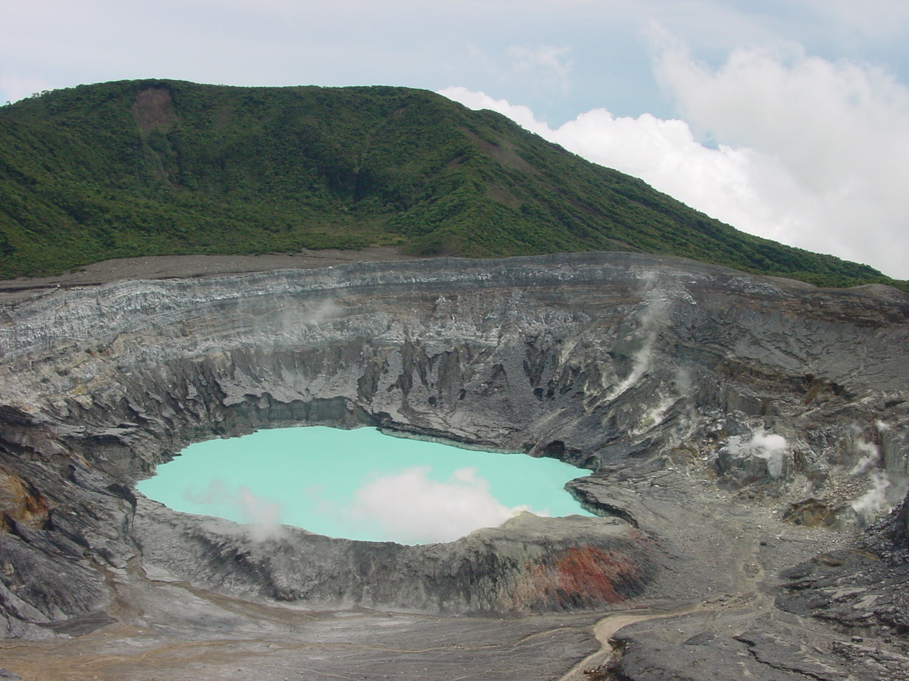 Eigen foto